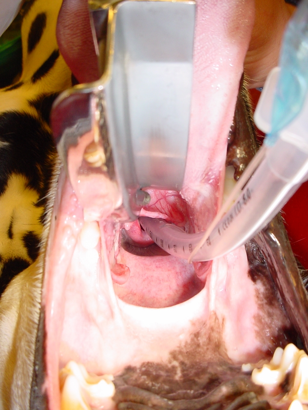 Intubierter Larynx, Hund